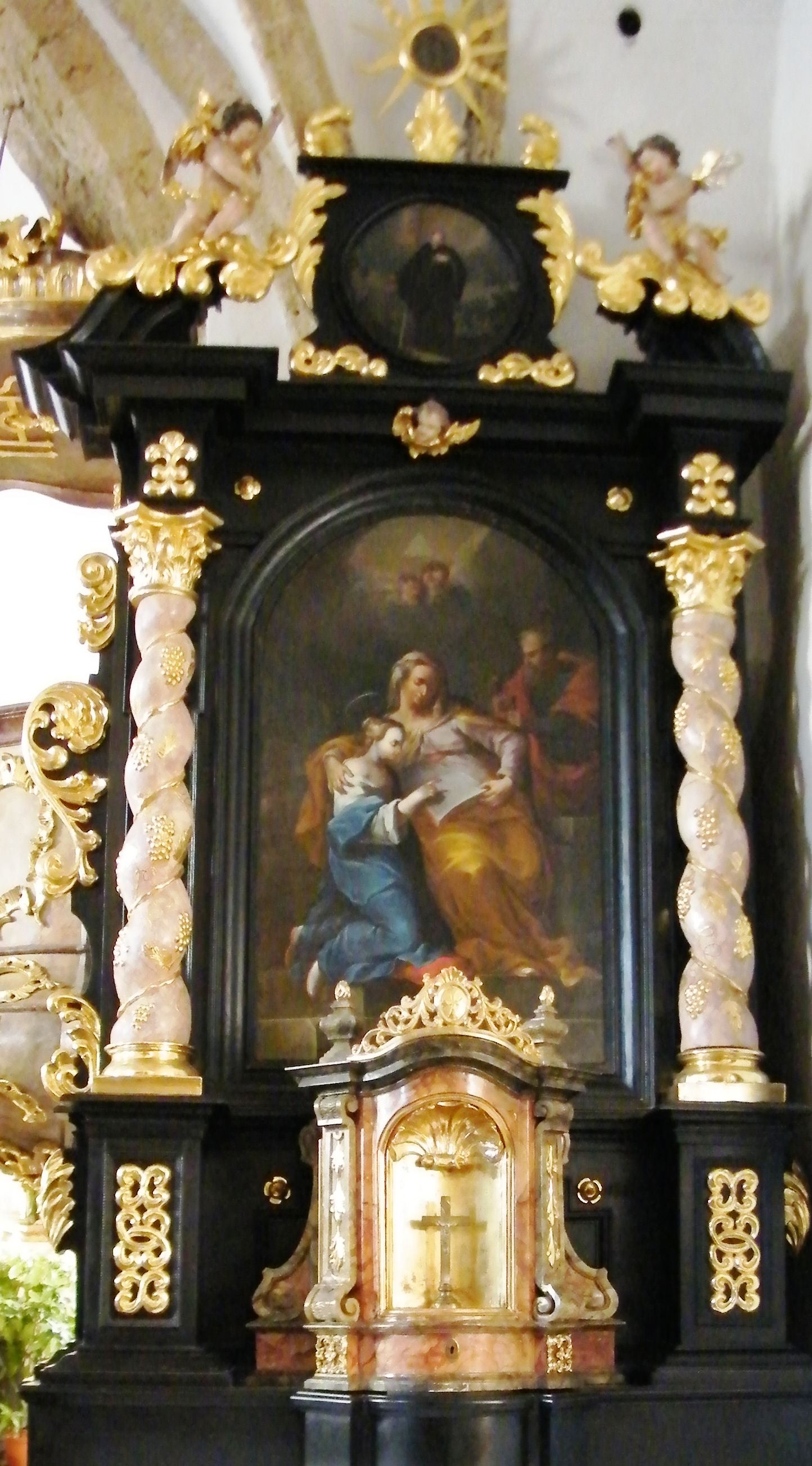 Altar von Tischler Wolf Hauser, Altarblatt von Christoph Scheen Faistenau 1689-90